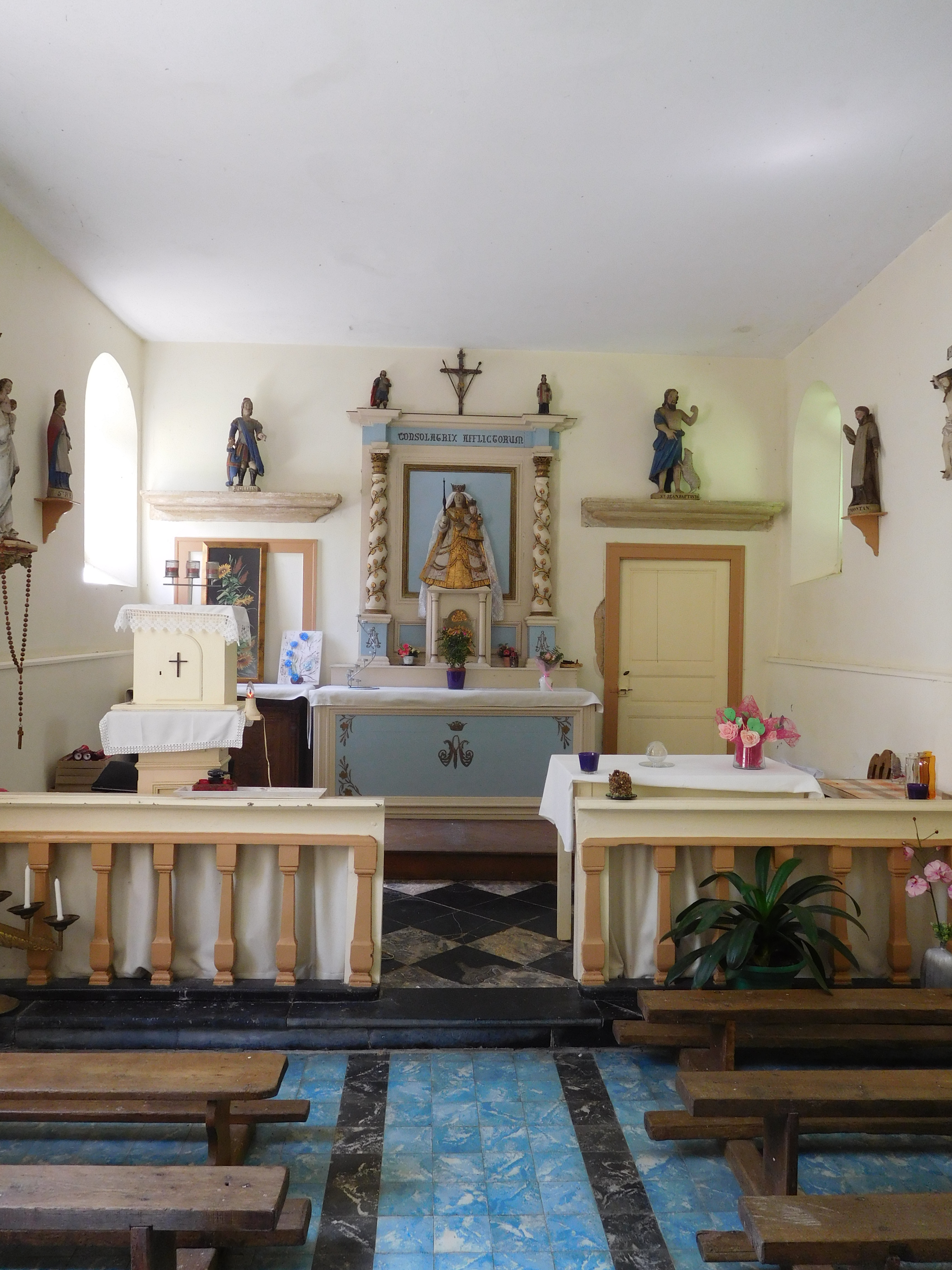 Intérieur de la chapelle de l'ermitage (autel à Notre-Dame, Consolatrice des Affligés), à Torgny (Belgique)